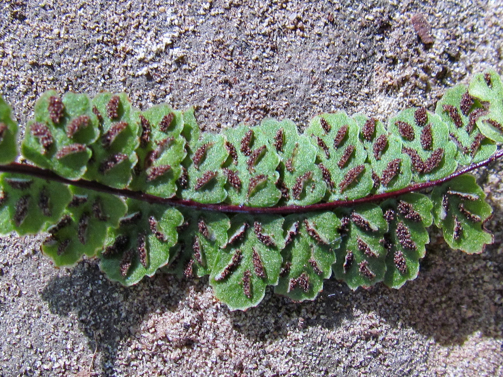 Asplenium trichomanes subsp. pachyrachis, Mullerthal, Luxembourg. Detail sori